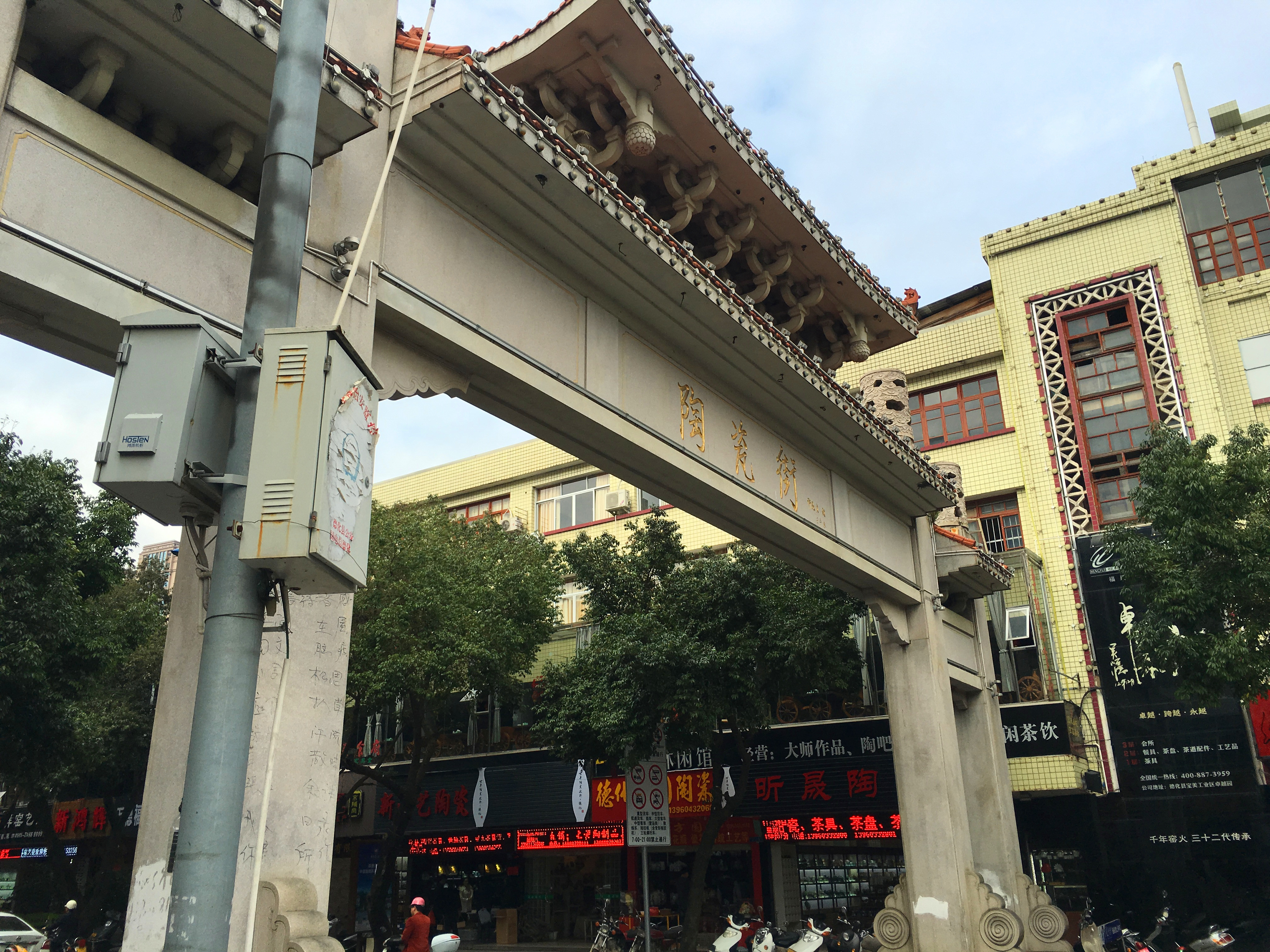 德化县陶瓷街